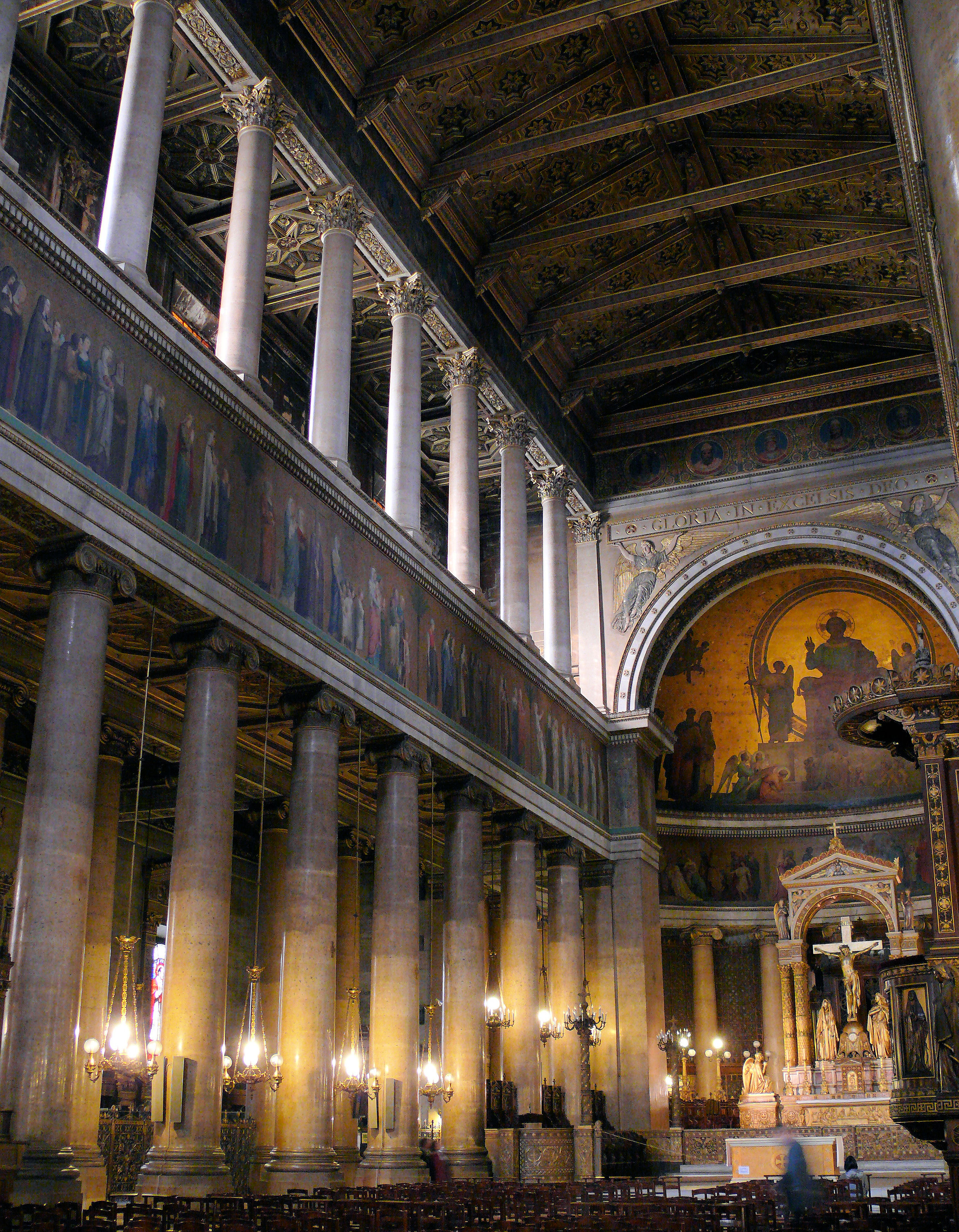 Paris 10e arrondissement - Eglise Saint-Vincent-de-Paul - Nef - Procession des saintes